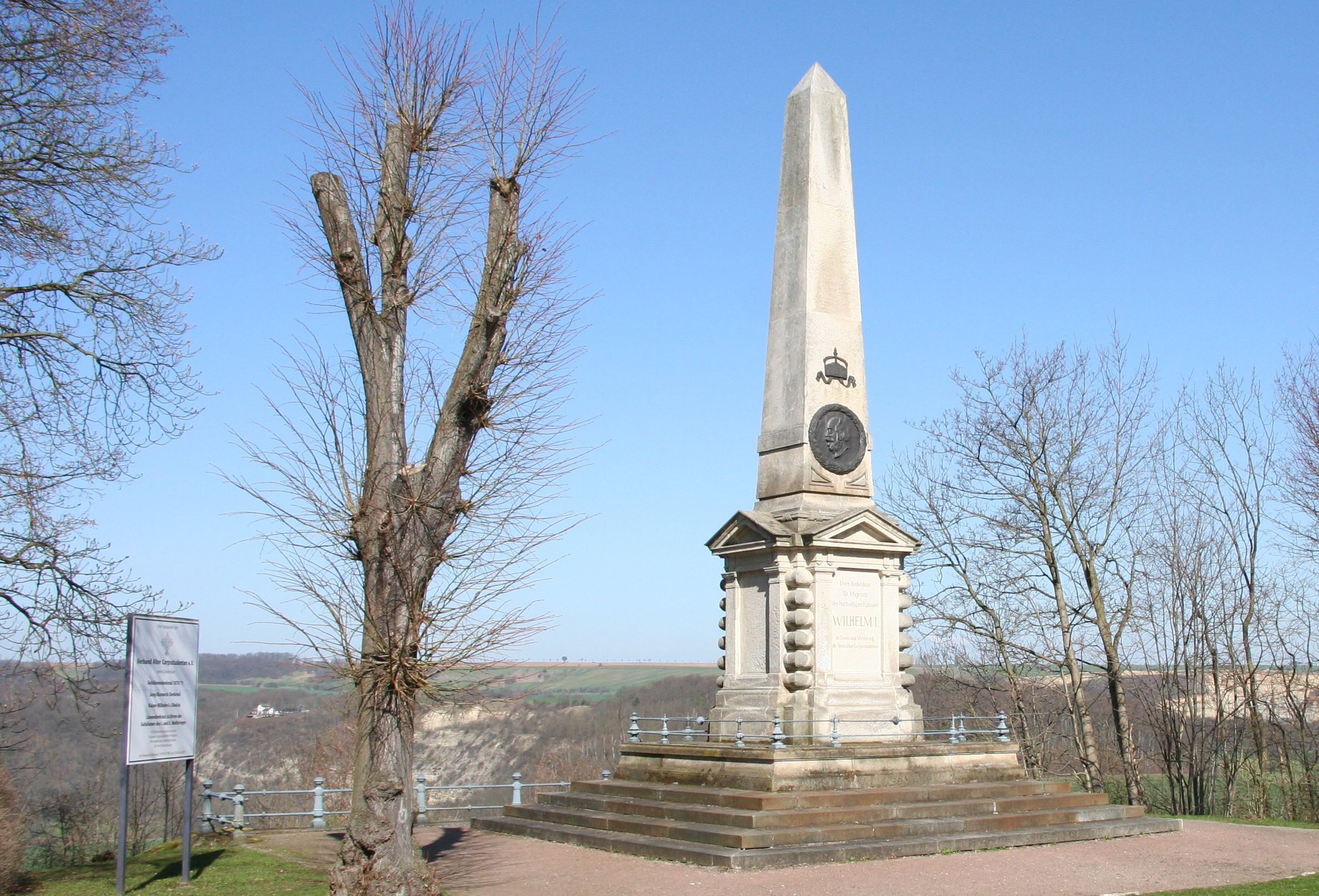 Coloured photograph of the Kaiser Wilhelm I. memorial at the Rudelsburg